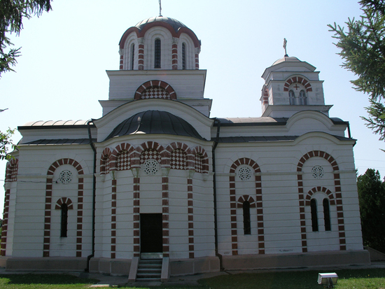 Црква Светог Пророка Јеремије у Врбовцу, са сајта